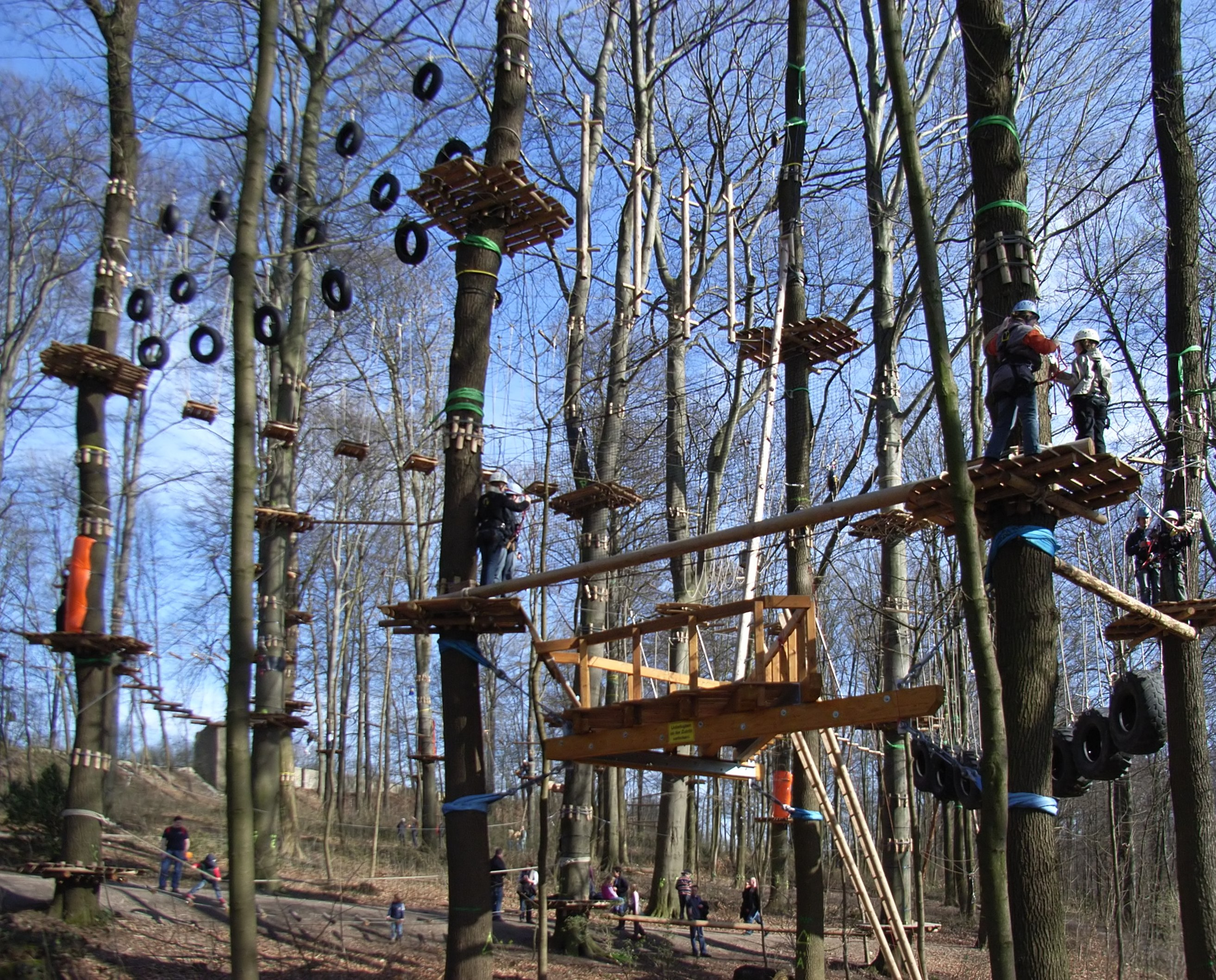 Bielefeld, Deutschland: Kletterpark auf dem Johannisberg.